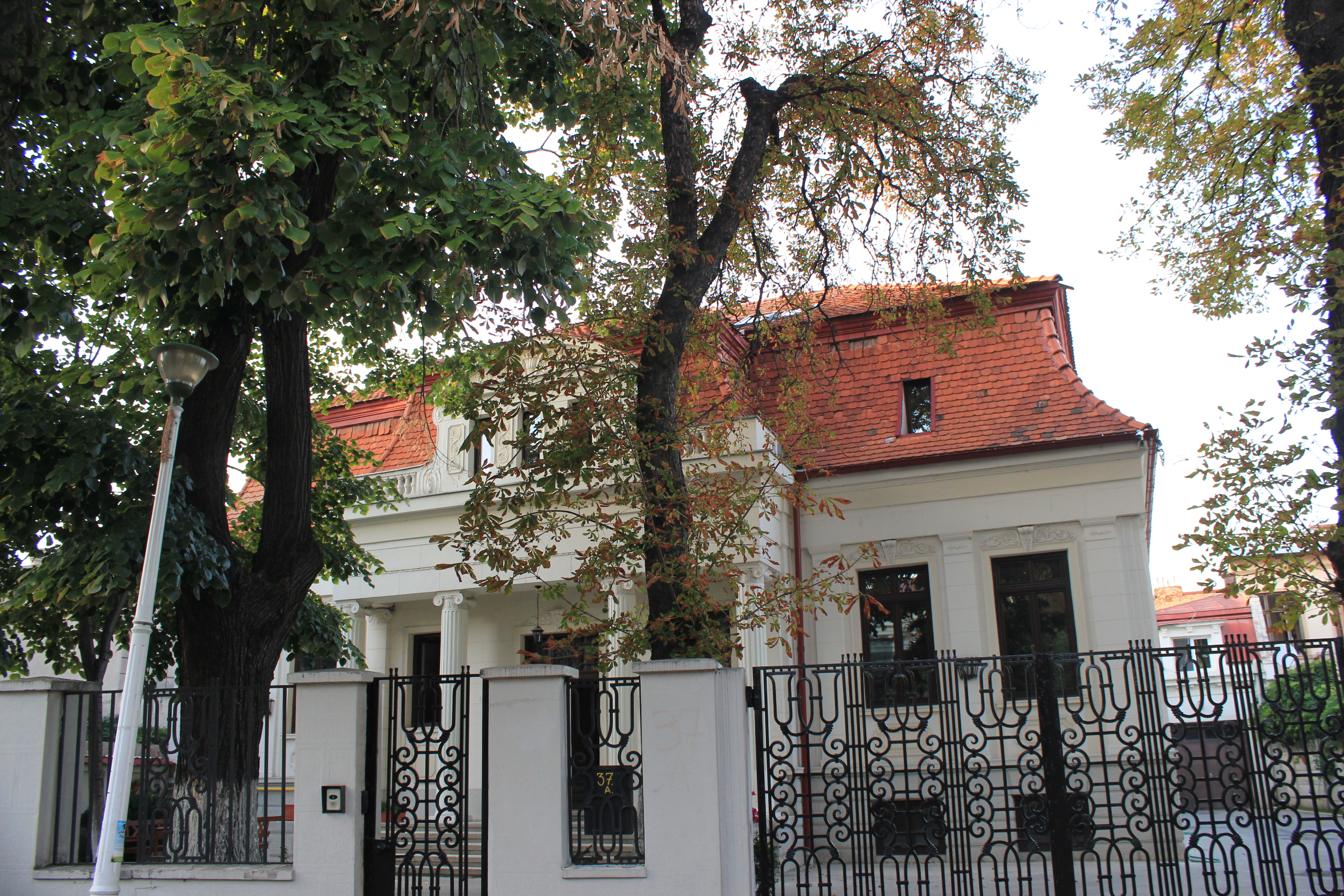 Casă Plantelor 37-37A